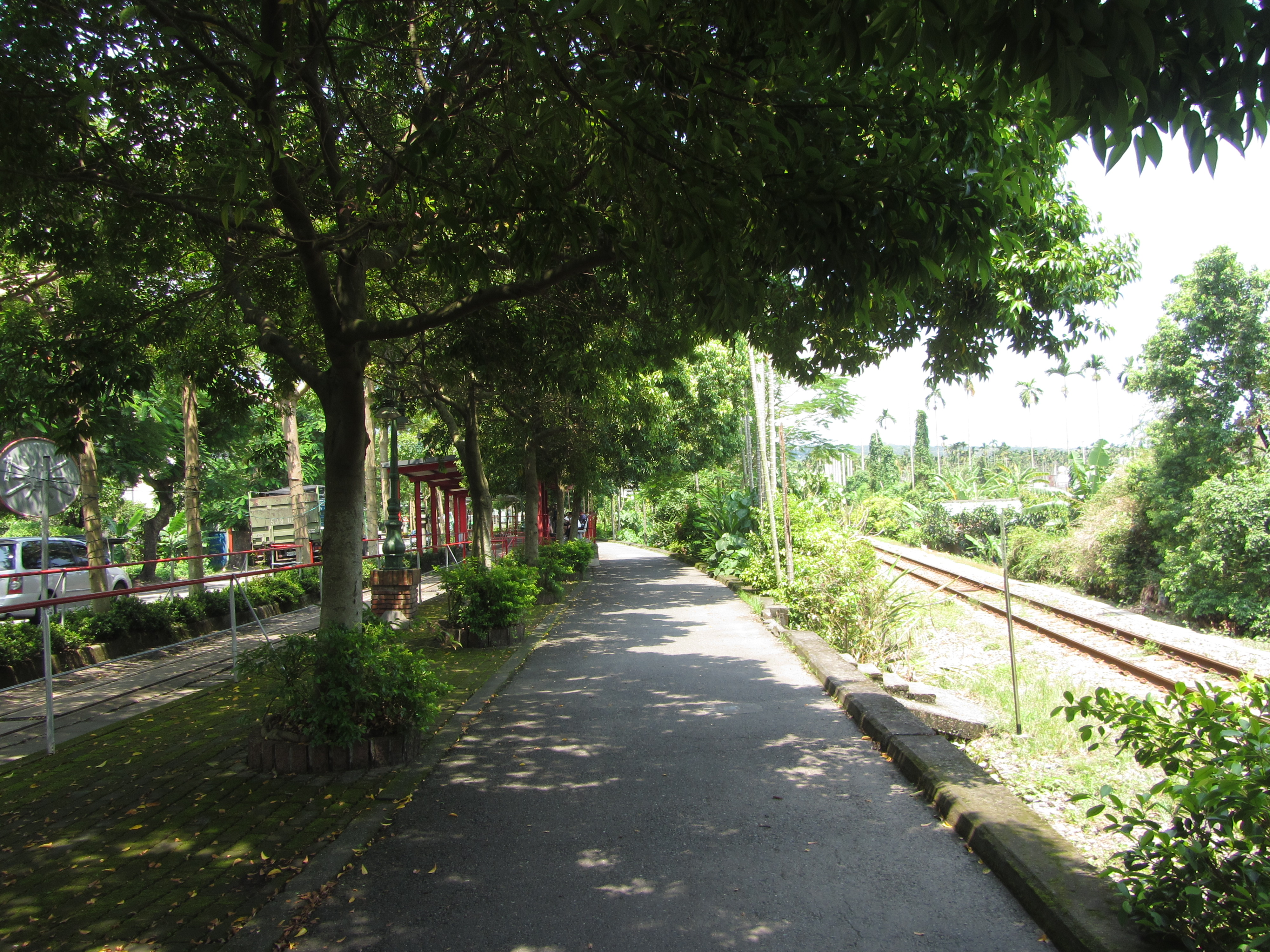 集集環鎮鐵道（左）與臺灣鐵路管理局集集線平行路段（右）。